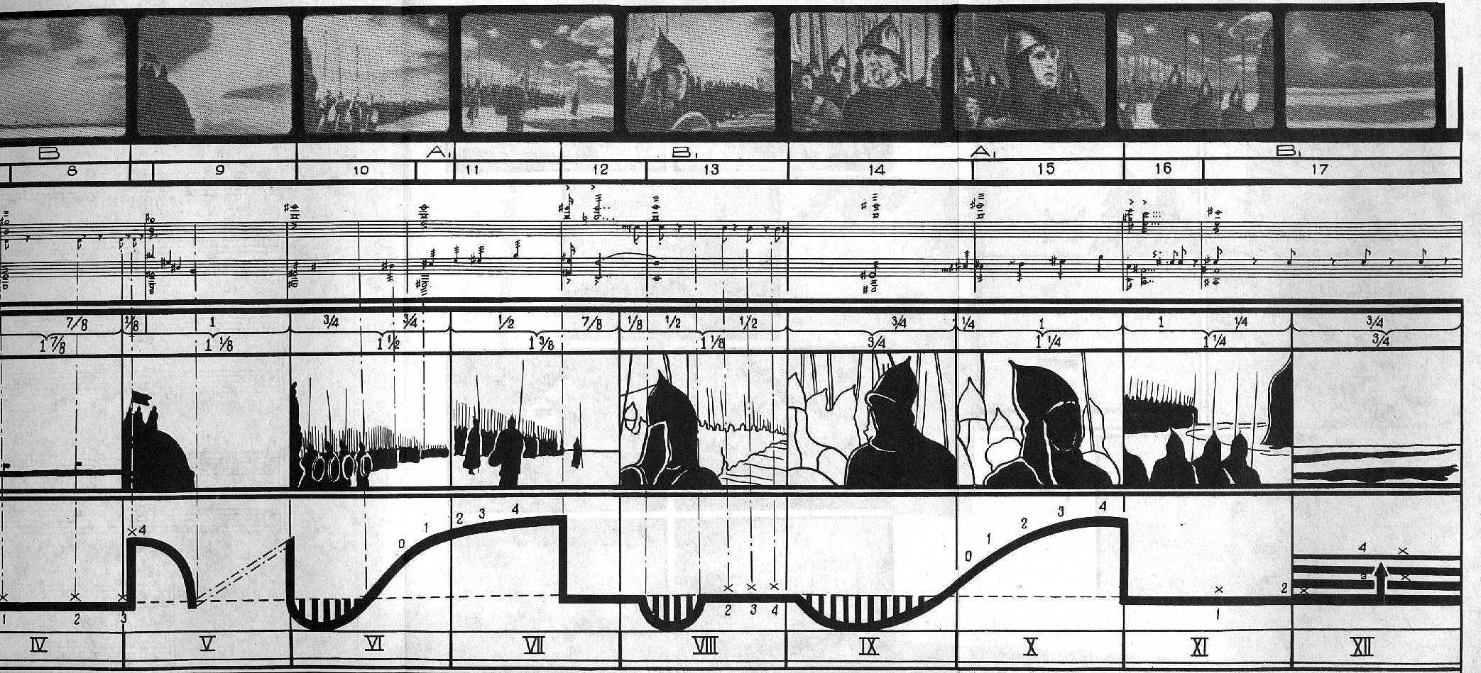 Вторая часть схемы (4-12) из сцены перед битвой в фильме "Александр Невский" 1938 г.